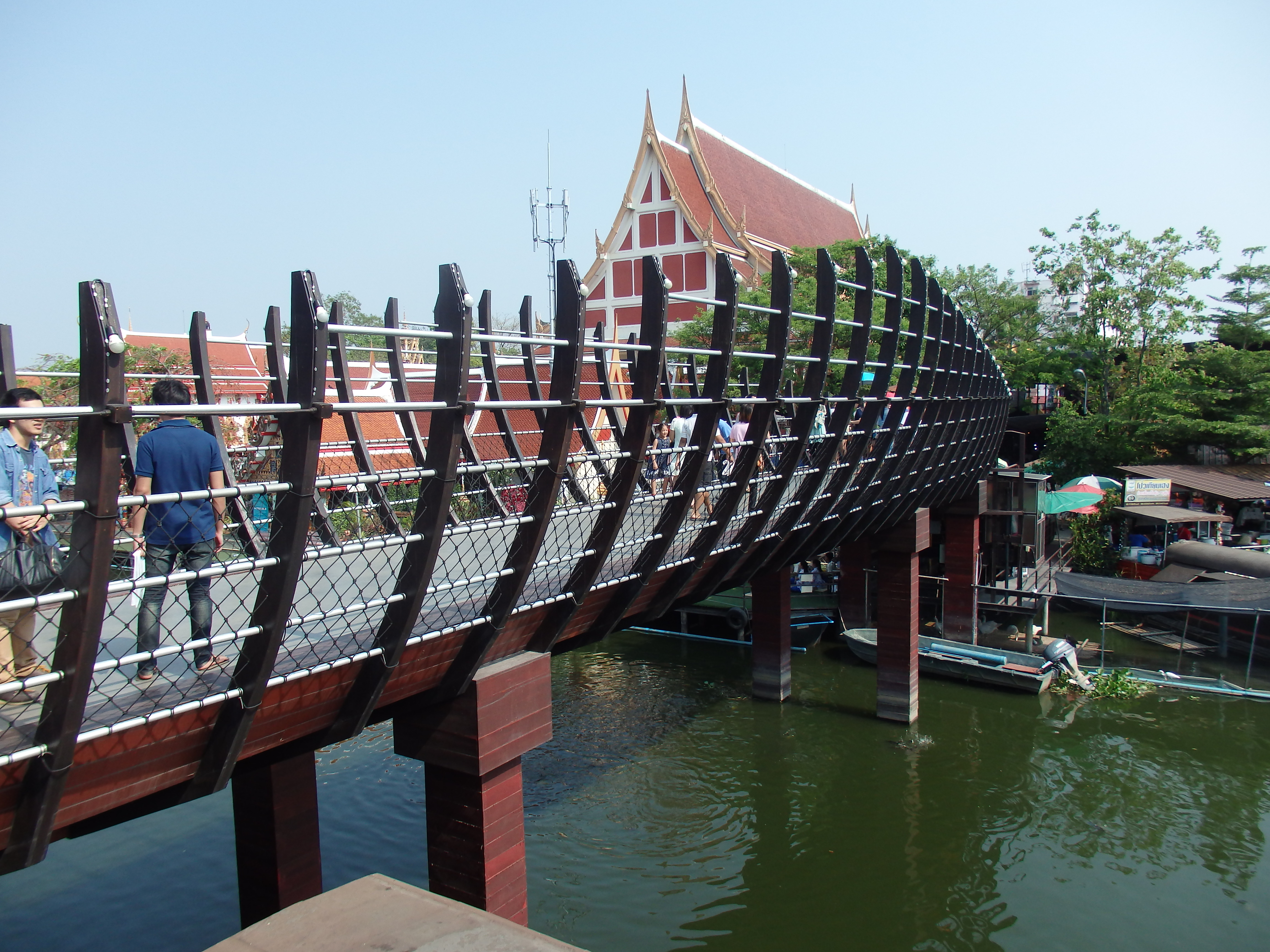 Min Buri, Bangkok 10510, Thailand